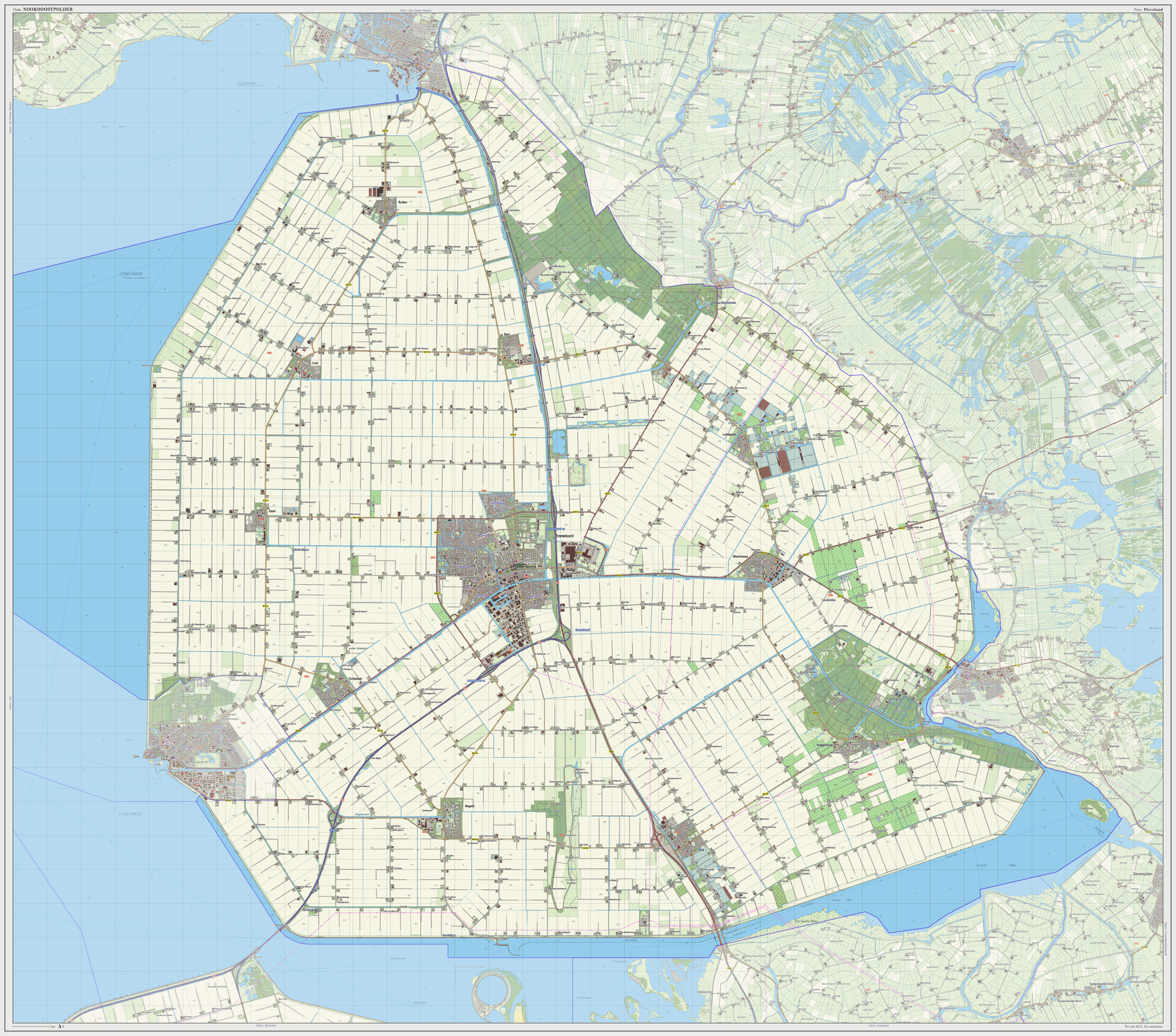 Topografische kaart van gemeente Noordoostpolder (2013). Samengesteld door Jan-Willem van Aalst op basis van de GML open geodata van de BRT/Top10NL (basisregistratie Topografie, Kadaster 2011), vrijgegeven door Kadaster onder de Creative Commons BY licentie. Additionele gegevens uit BAG (8 juli 2013), uit de Open Street Map (9 juli 2013) en uit de Risicokaart. Peildatum kaartbeeld: 9 juli 2013. Zie ook Gemeentenatlas.nl Samenstelling en kleurenschema: Jan-Willem van Aalst, met QuantumGIS en Photoshop. Zie ook de Legenda.